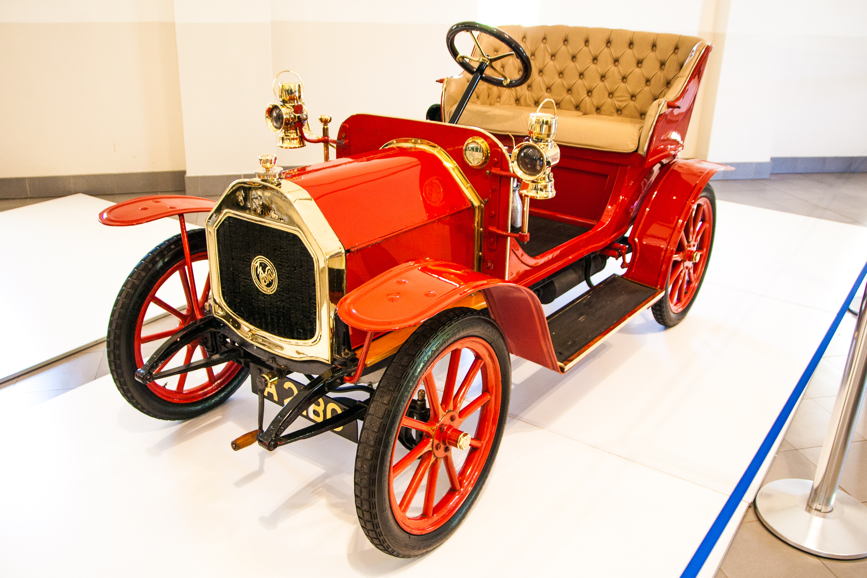 1909 Lezebre Type-A -2.jpg